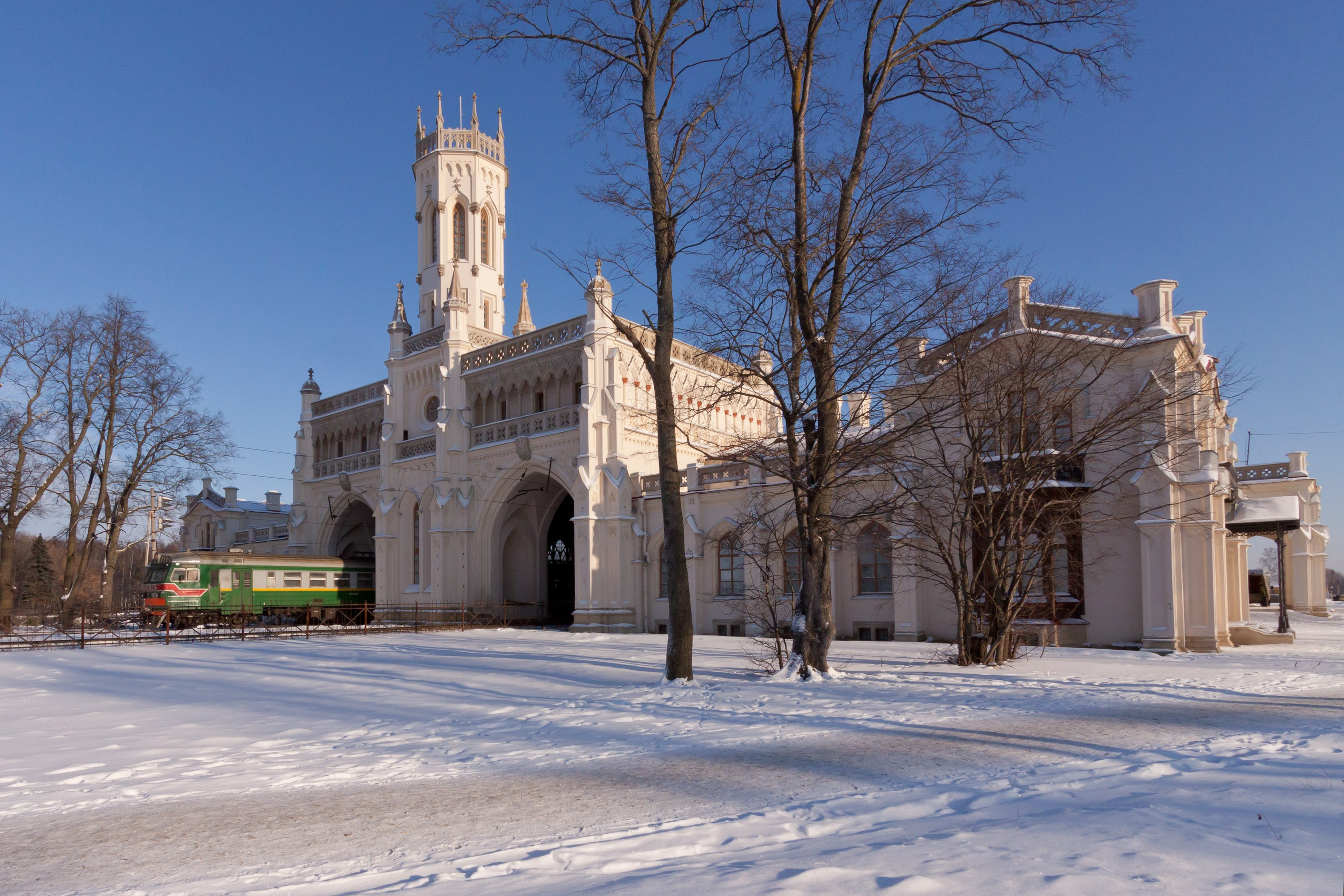 Вокзал железнодорожной станции «Новый Петергоф» (Санкт-Петербург и Лен.область, Петергоф, ж. -д. ст. "Новый Петергоф")